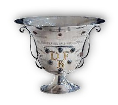 Eine Abbildung des Tschammerpokals auf einer Fahne am easyCredit-Stadion zum Pokalsieg des FCN 1935. Durch die Fahnenbewegung leicht verzogen.